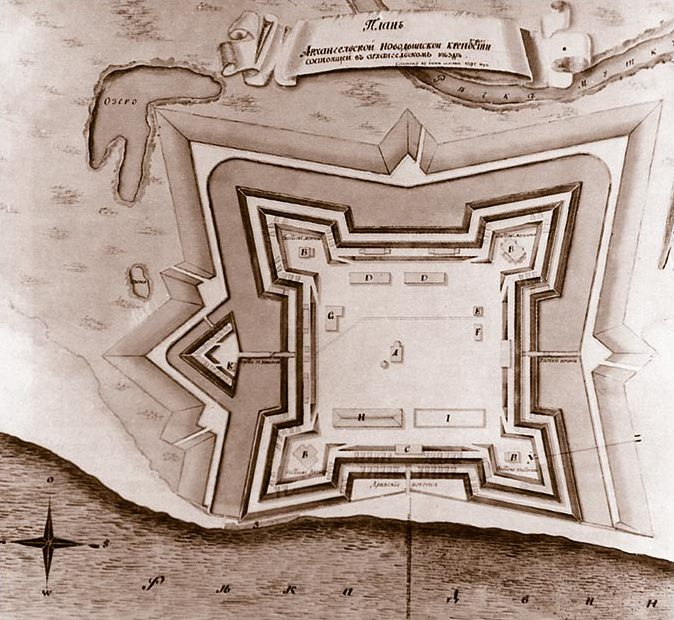 Plan of Novodvinsk Fort in Arkhangelsk, as represented in a en:1799 album.